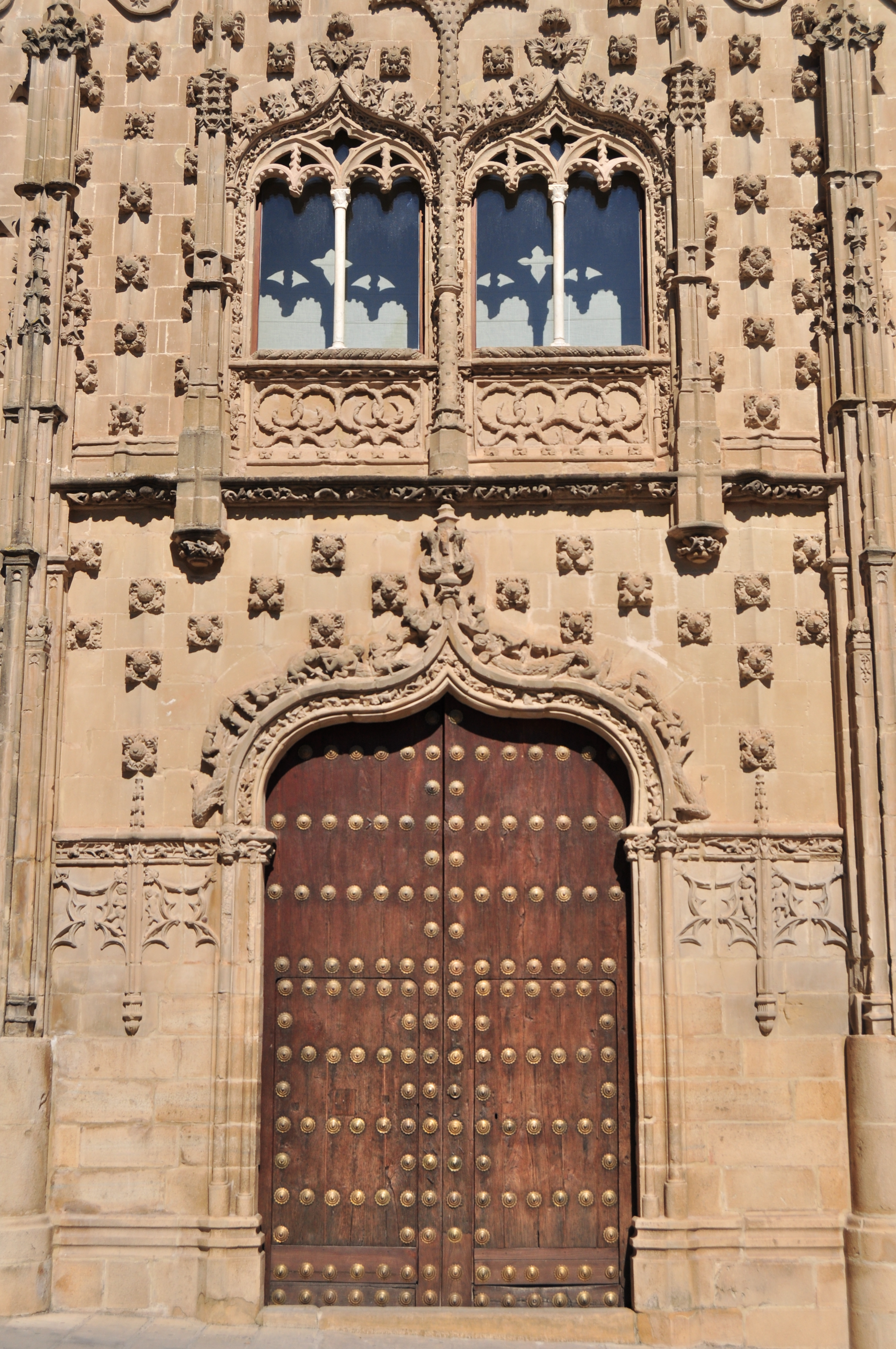 Baeza - 048